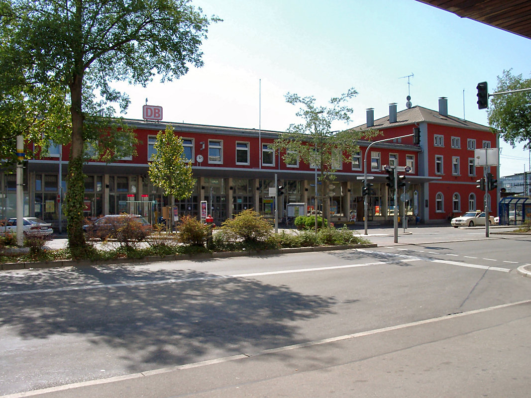 Bildbeschreibung: Bahnhof von Singen Fotograf/Zeichner: Peter Stein Datum:24.08.2003